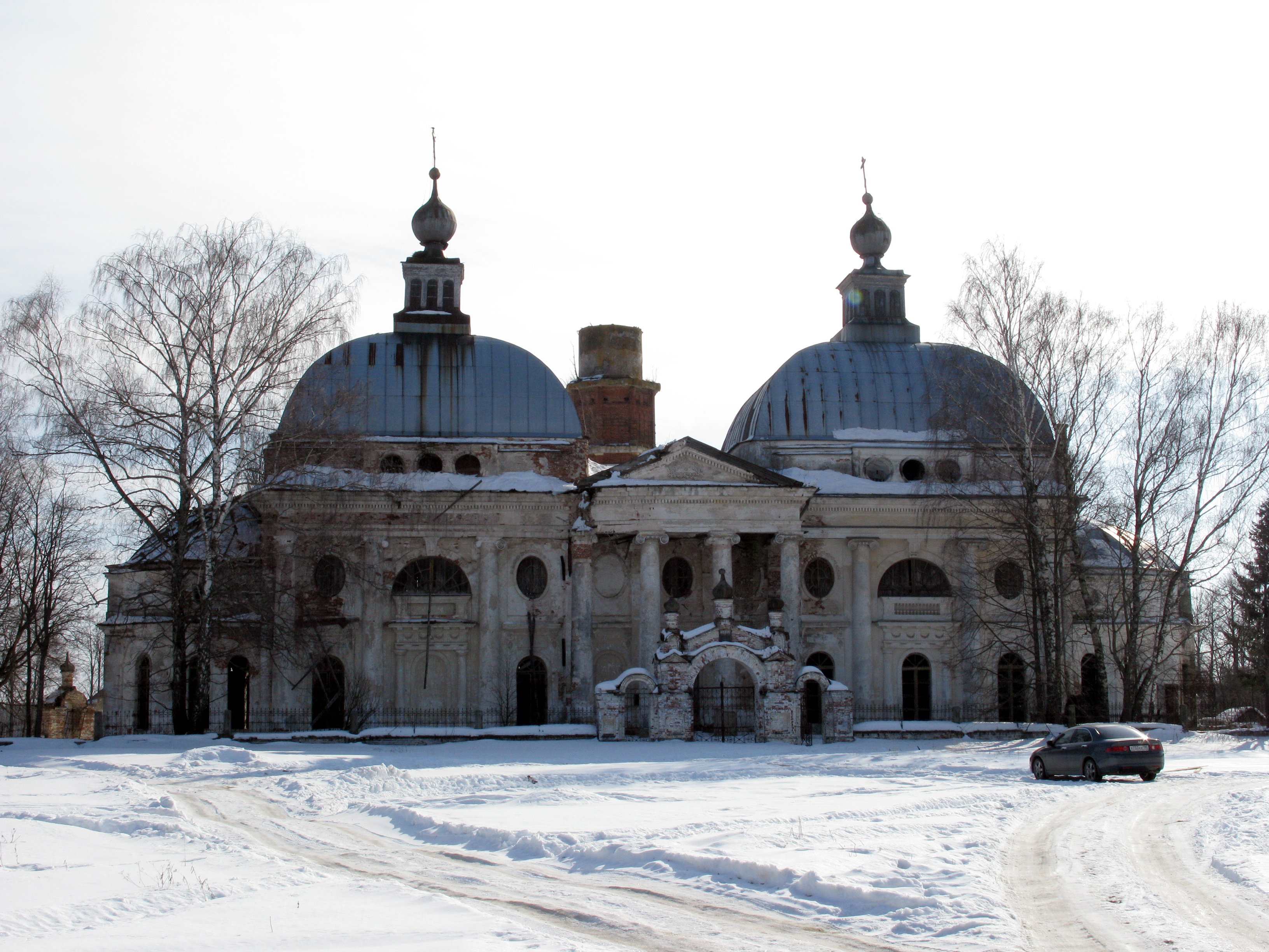 Храм Казанской иконы Божией Матери в селе Ярополец